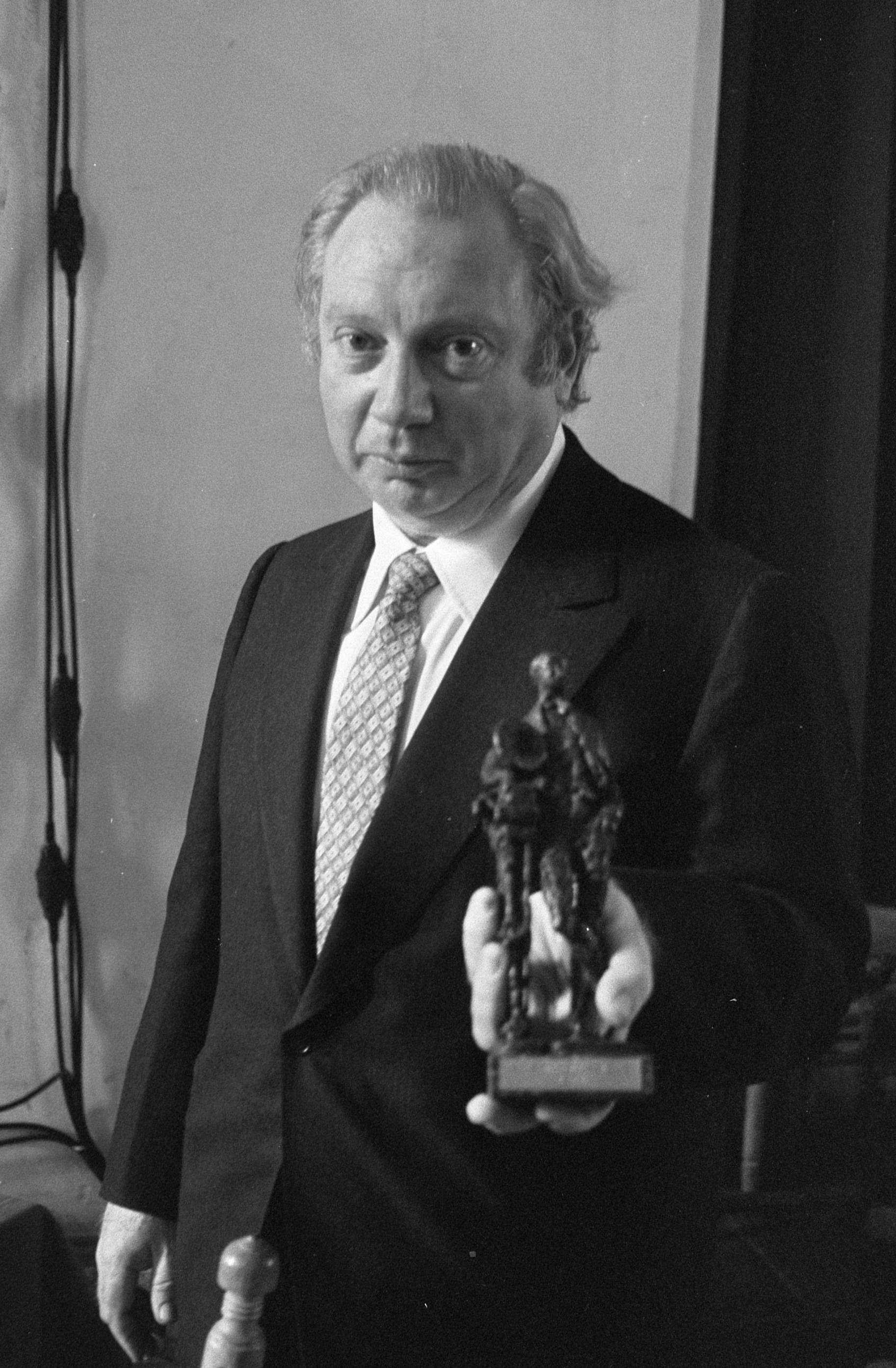 Uitreiking Edisons Klassiek 1971 in Geertekerk Utrecht, Isaac Stern met Edison